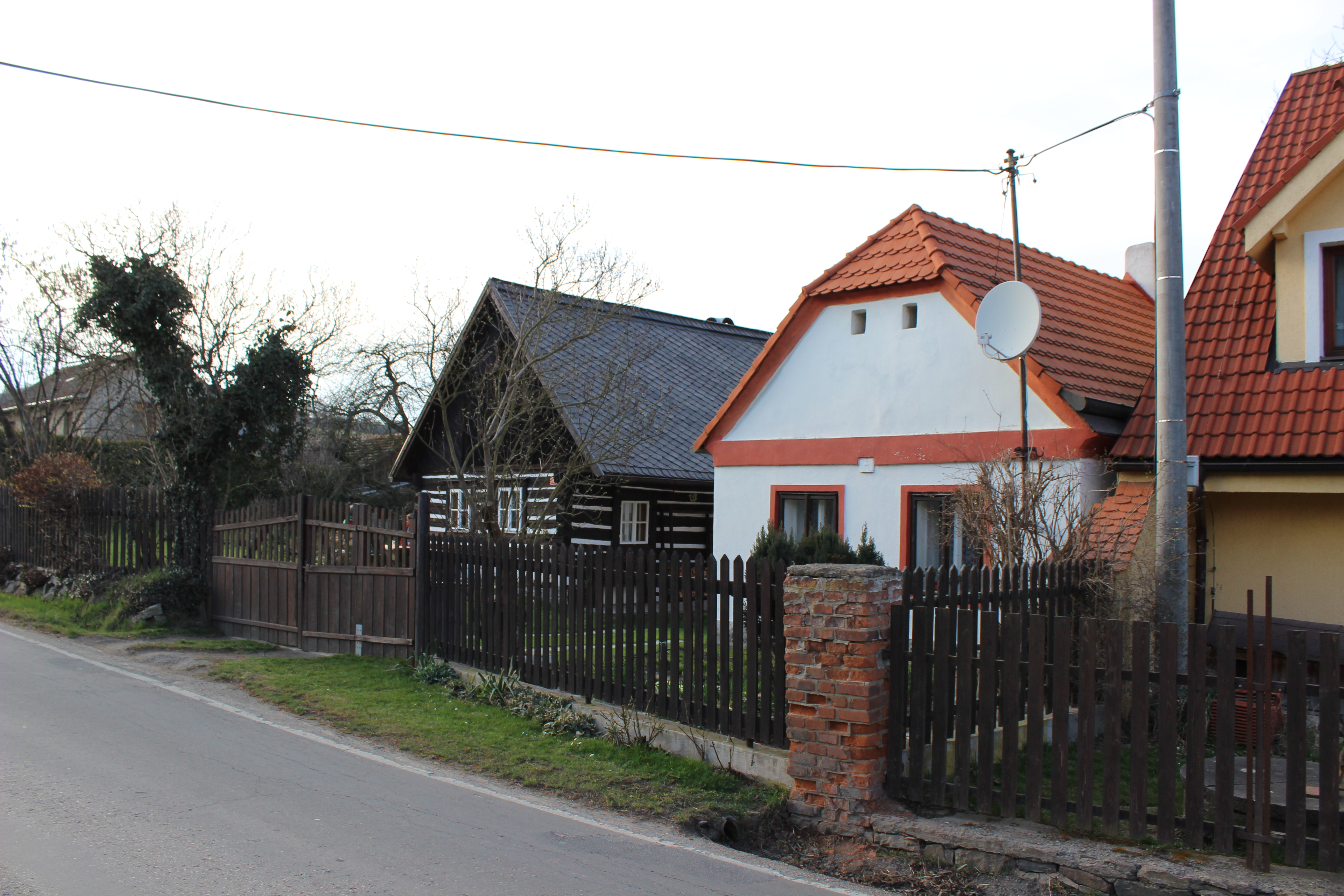 Zástavba v Břevnici po severní straně silnice II/114 směrem ke Strannému. S černou střechou dům číslo popisné 4, před ním (s bílým štítem) dům číslo popisné 9, od něj napravo dům číslo popisné 6. This photograph was taken with a Canon EOS 600D